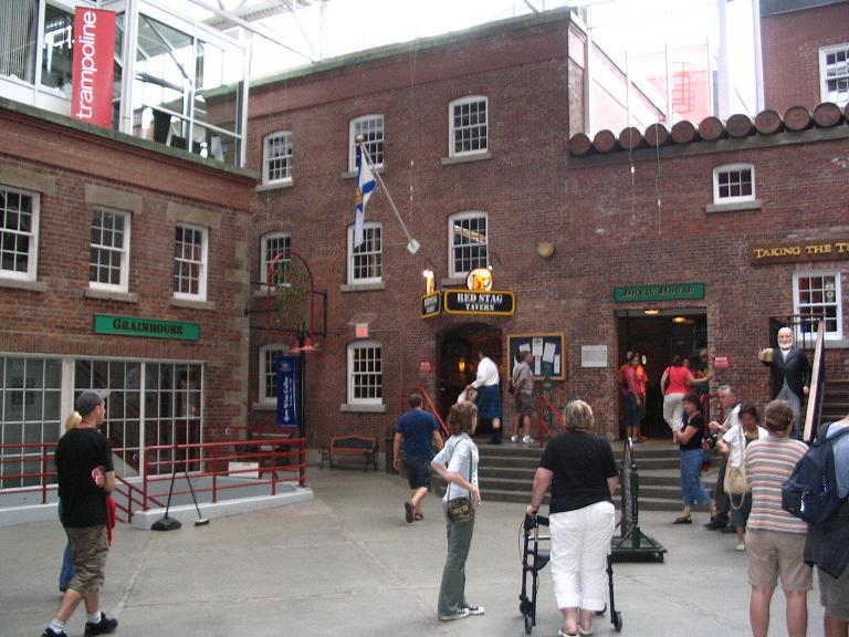 L'intérieur de la brasserie Alexander Keith's, à Halifax, en Nouvelle-Écosse.